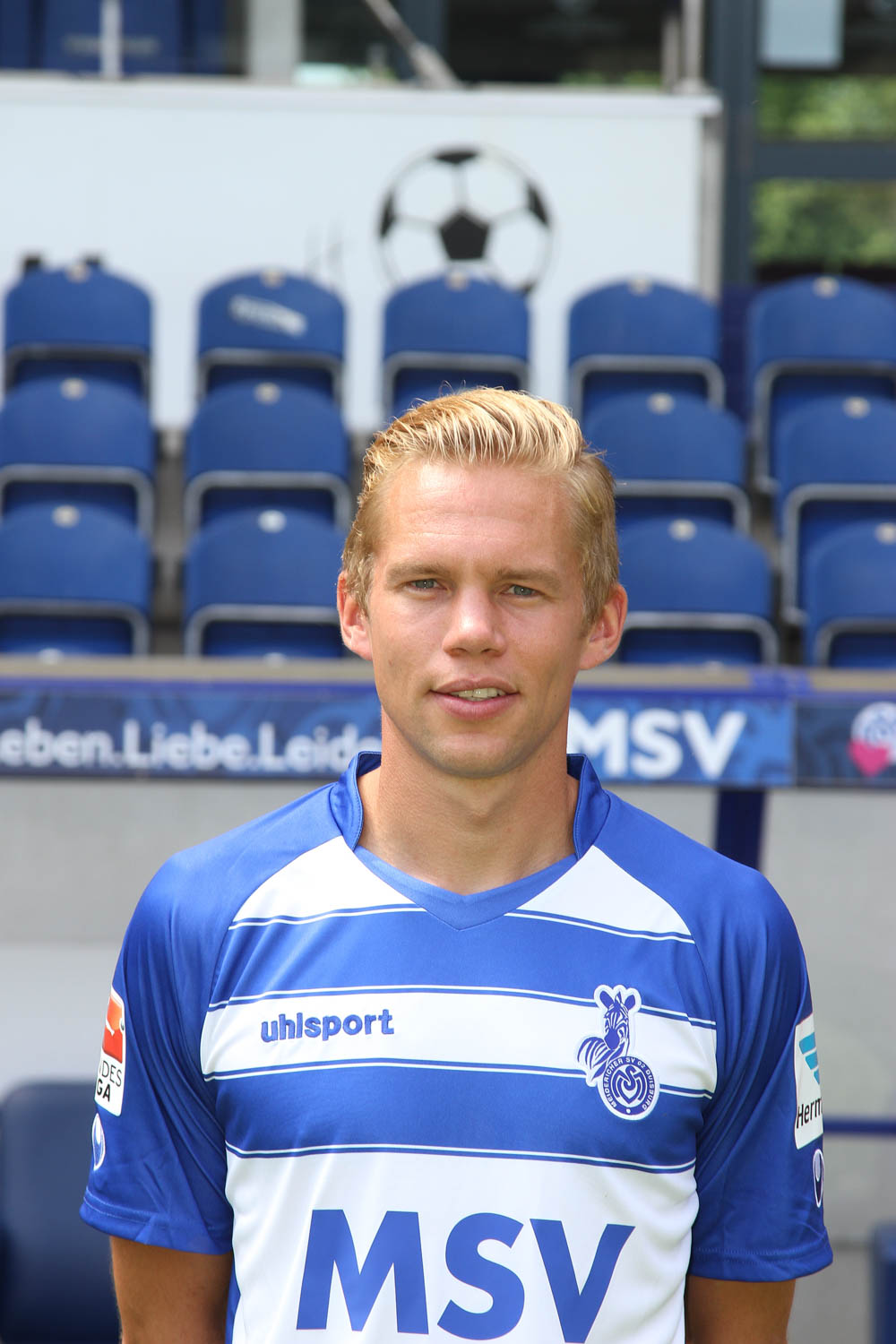 Dennis Grote 2015